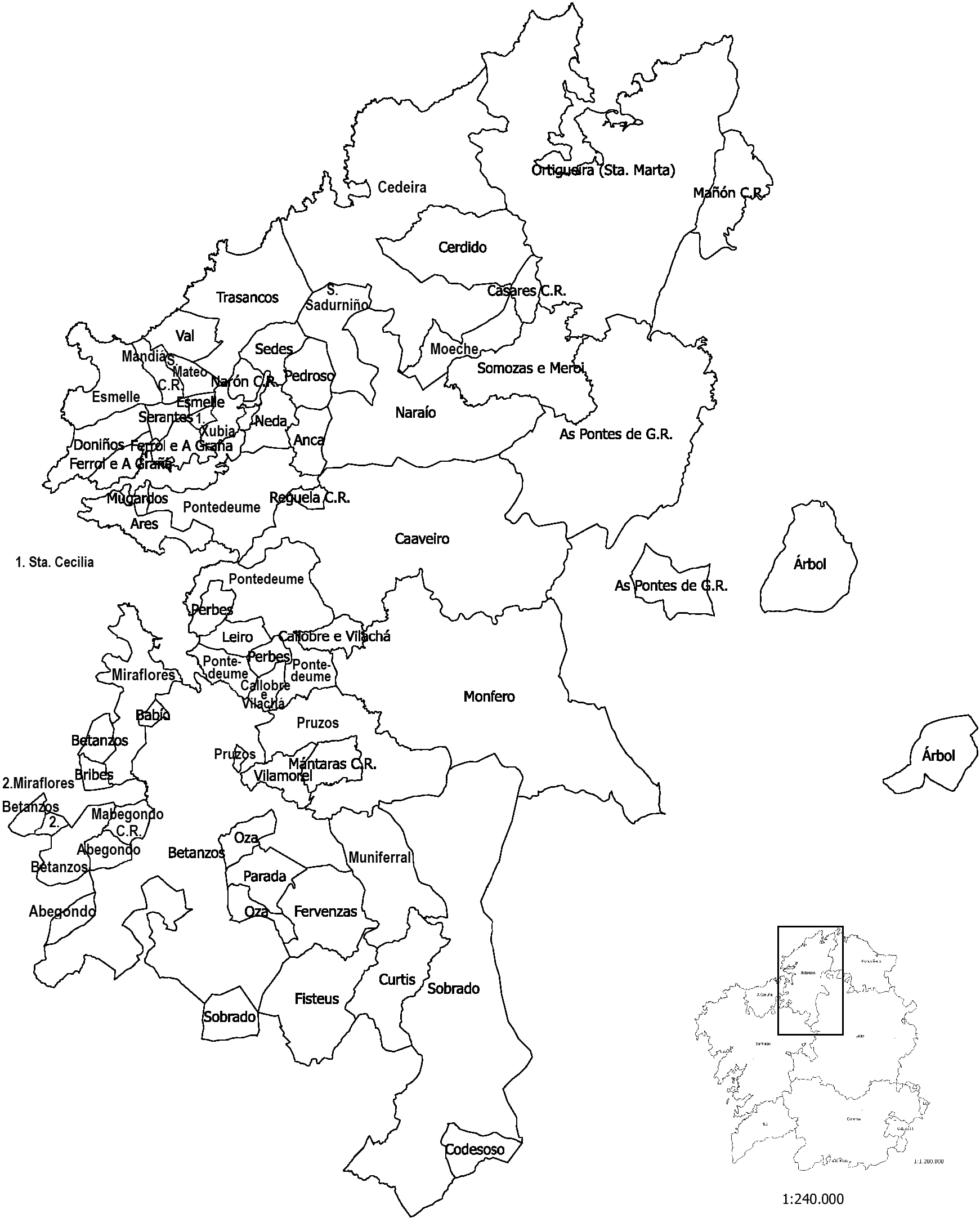 Xurisdicións da provincia de Betanzos.Nota: A diferenza do que se amosa no mapa, as xurisdicións de Curtis e de Fisteus só se estendían pola metade sur das súas respectivas parroquias homónimas e pertencían á provincia de Santiago. O resto, o couto do Rincón no caso da parroquia de Curtis e o couto das Merelas no caso da de Fisteus, pertencían á xurisdición de Sobrado.